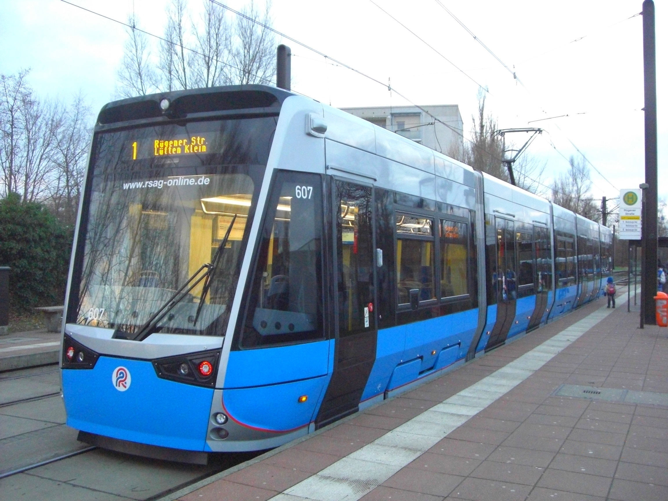 RSAG Tramlink 6N2 an der Endhaltestelle Rügener Straße im Stadtteil Lütten-Klein